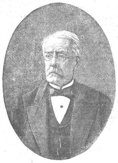 Retrato de Francisco Méndez Álvaro